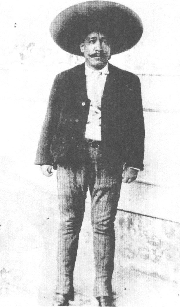 El Zapatista General Manuel Palafox.